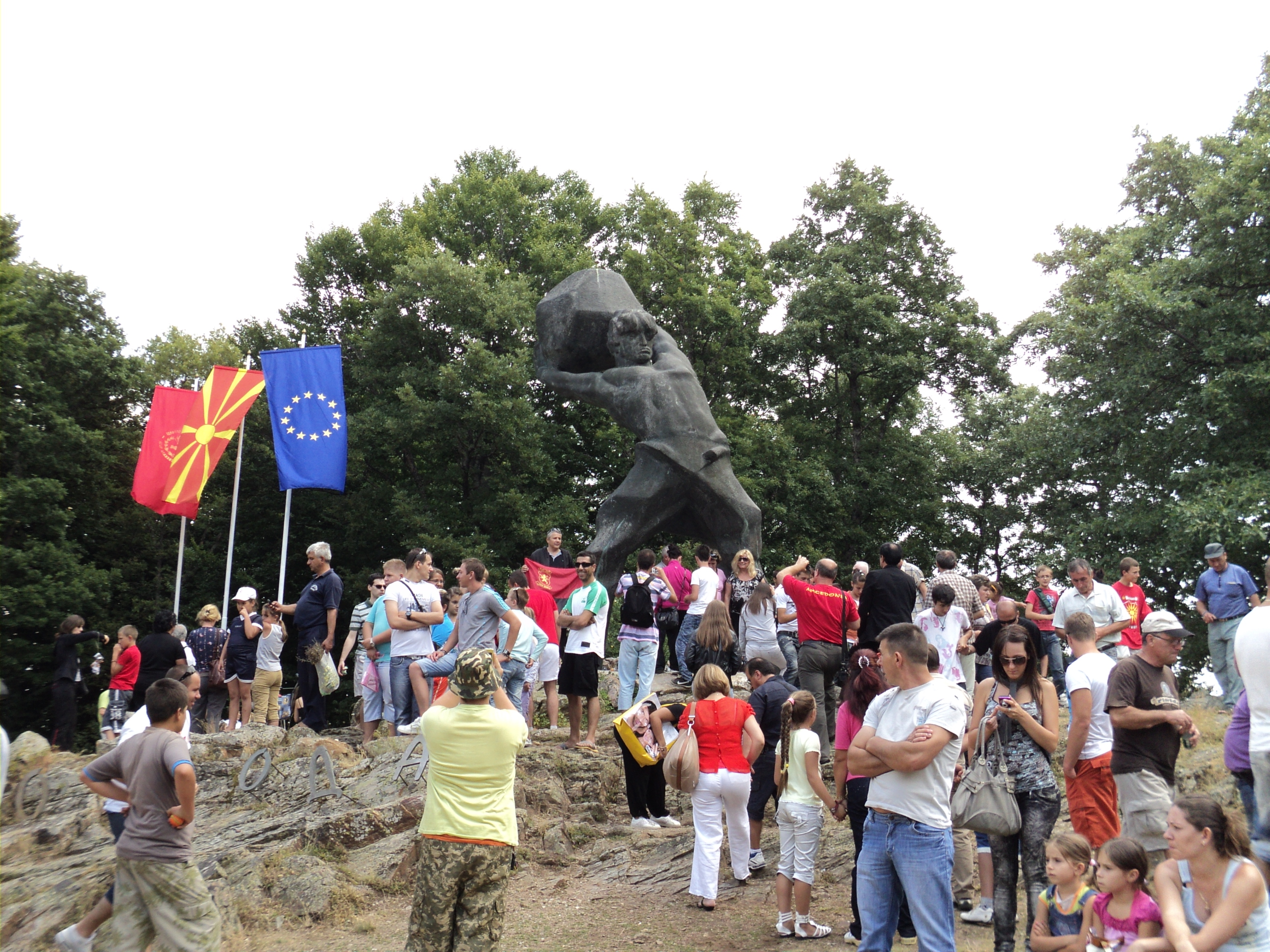 Proslava Ilindena 2. avgusta 2011. godine na Mečkinom kamenu, kod Kruševa